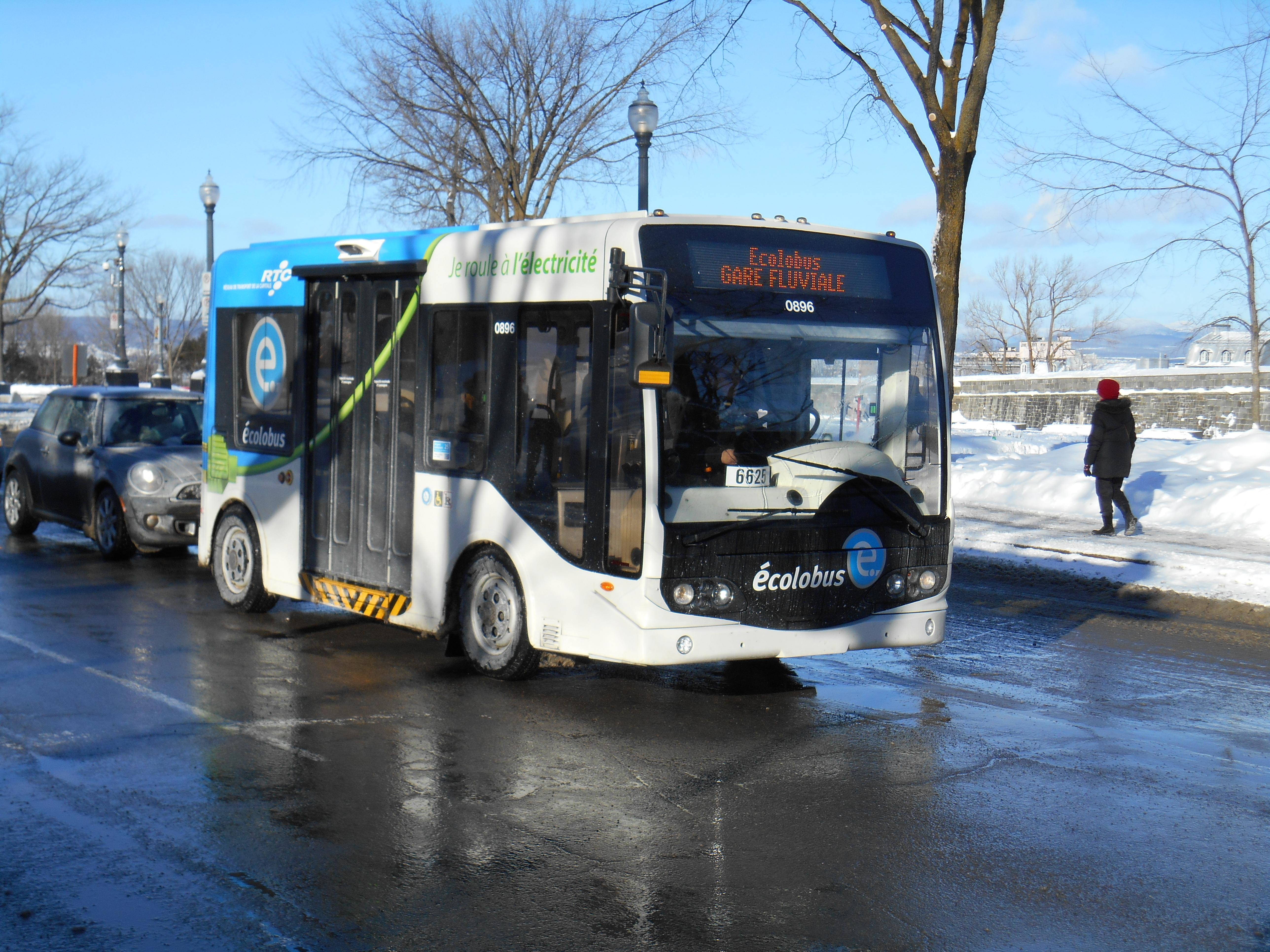 Écolobus, Québec